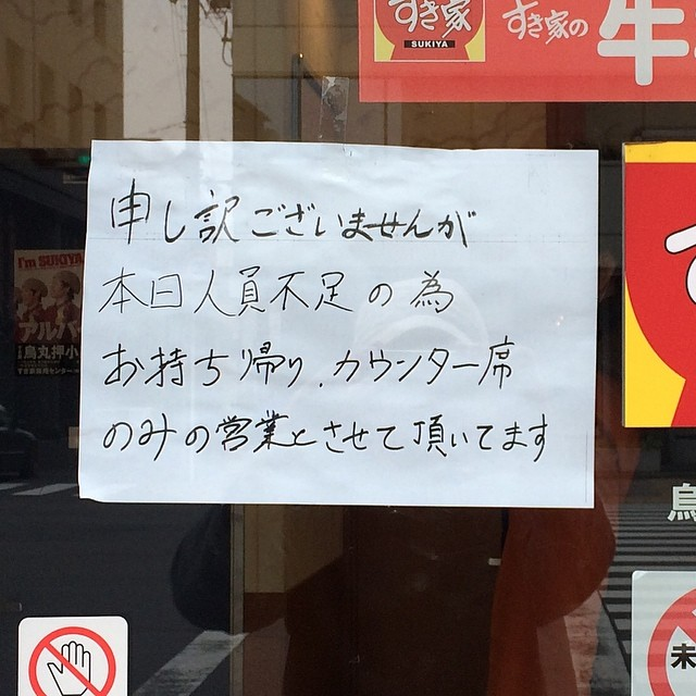 烏丸押小路店 [1]